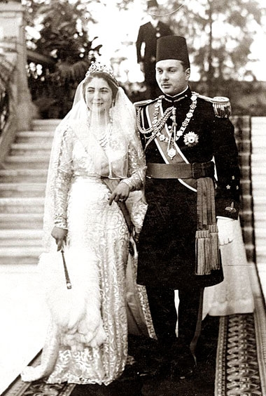 الملك فاروق والملكة فريدة بعد وصولها قصر القبة